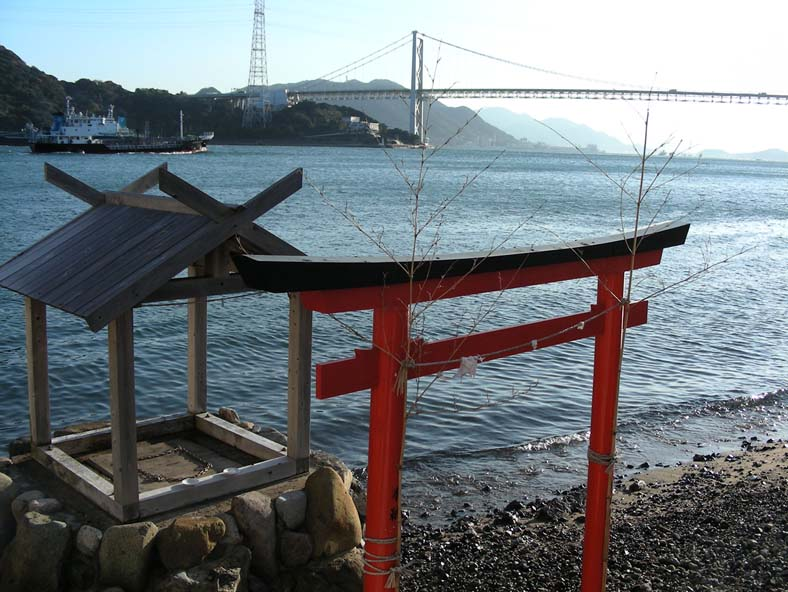 下関市前田町の関門海峡沿い「平家の一杯水」と関門橋